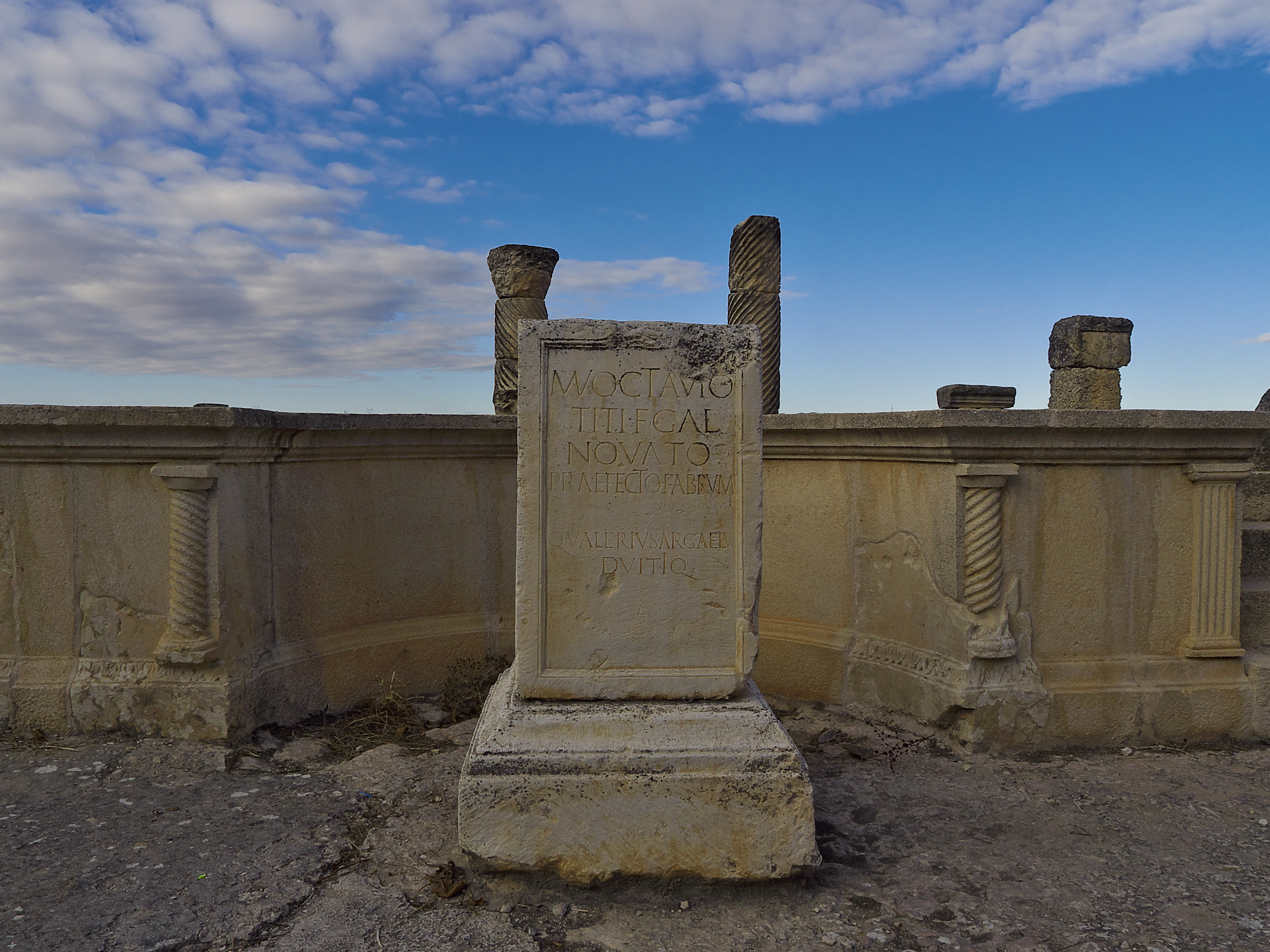 Un eficiente aparejador militar (praefectus fabrum) del teatro de Segóbriga (100 a.C.)